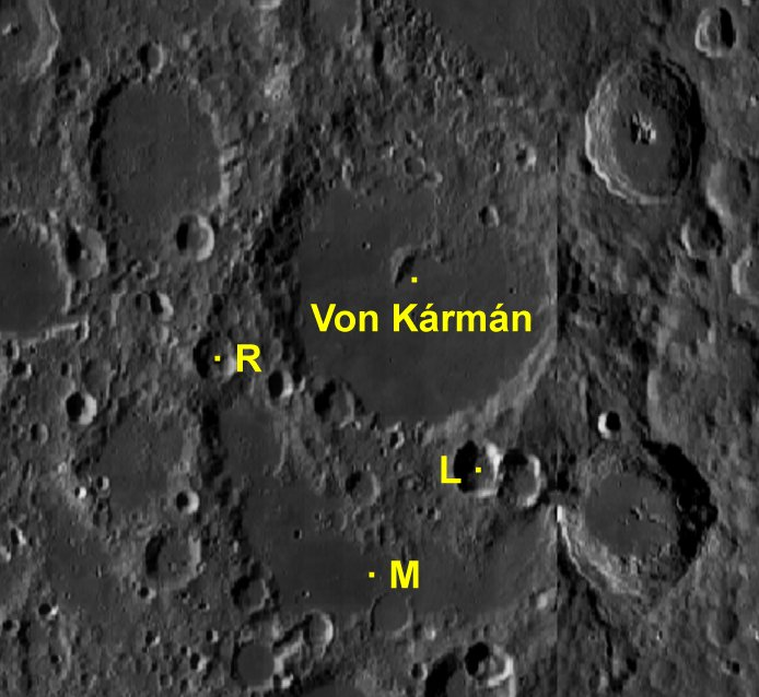 Cráter lunar Von Kármán. Cráteres satélite. (Imagen LRO)